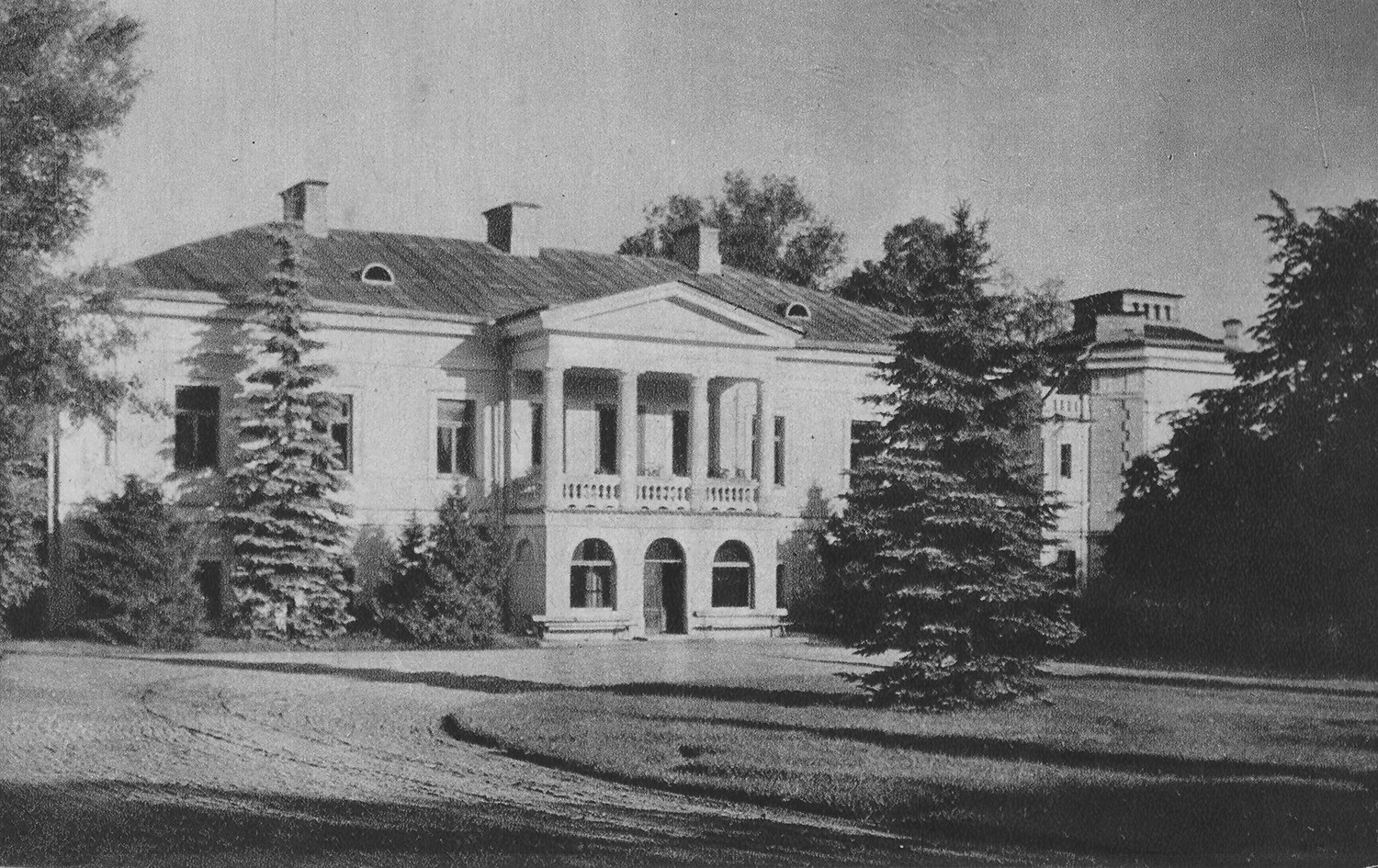 Беларуская (тарашкевіца): Яшуны (Jašuny), сядзіба Балінскіх (Balinski)